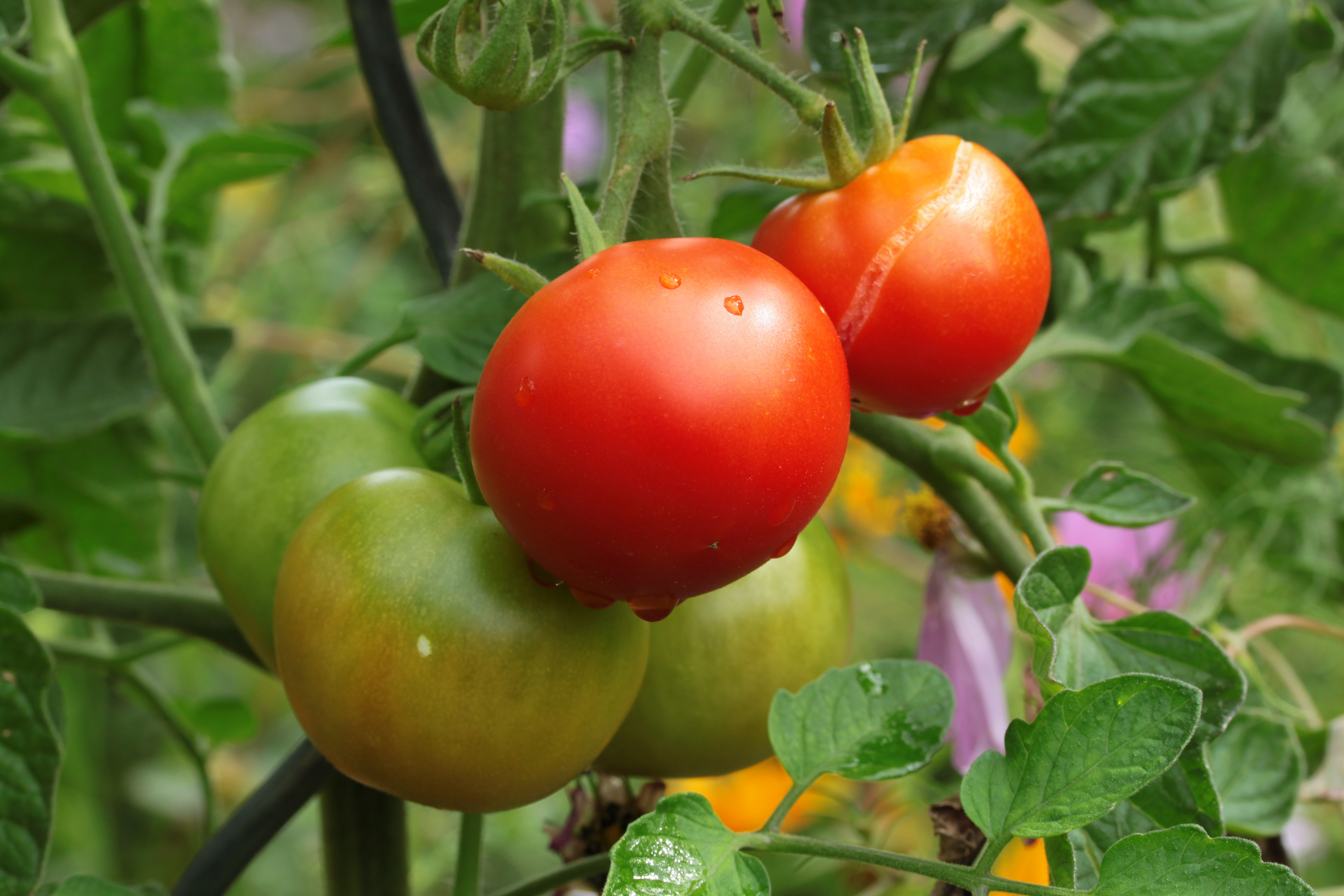 Gartenpflanzen, Doberschau im Landkreis Bautzen, Sachsen